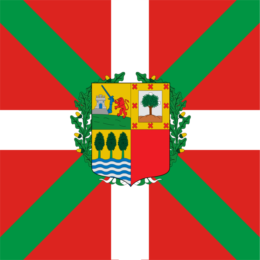 Guión presidencial del Lehendakari del Gobierno Vasco